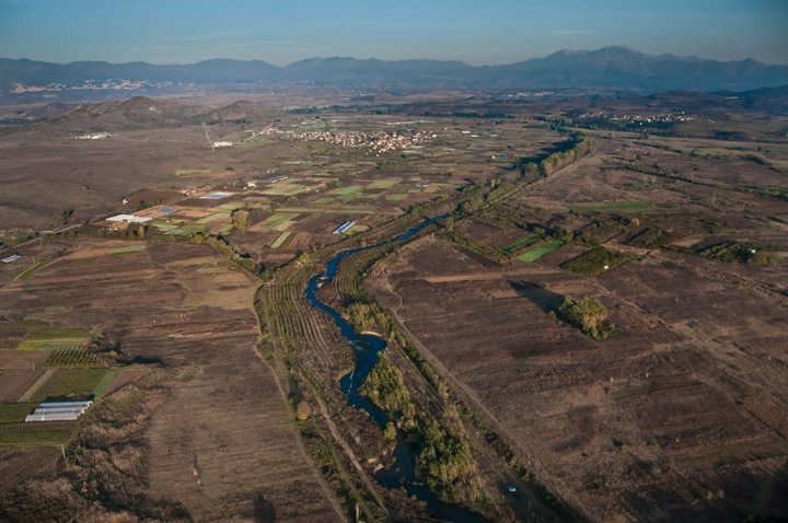 Река Струмешница, село Рупите, планина Кожух, планина Пирин